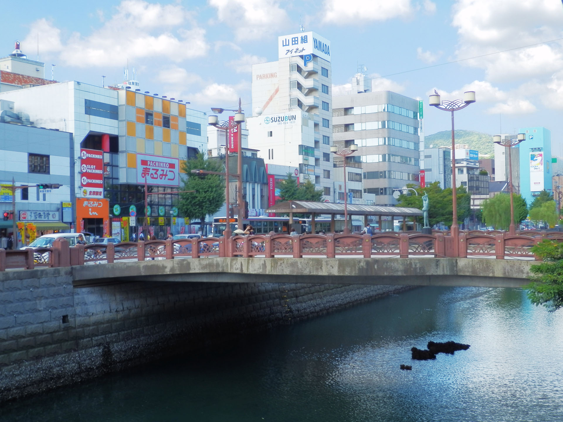 長崎市の銕橋(くろがねばし) (Kurogane bridge in Nagasaki Japan)